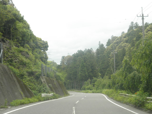 徳島県名西郡神山町鬼籠野川東 徳島県道21号神山鮎喰線 立見峠